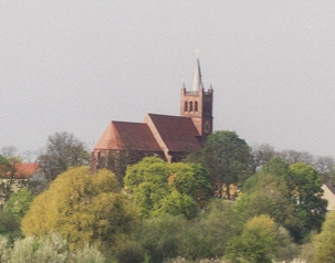 Stadtpfarrkirche St. Marien in Muencheberg (Deutschland)